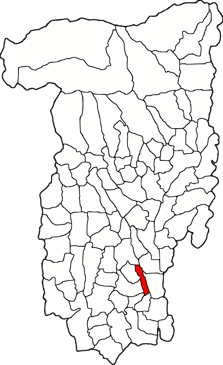 Lage der Gemeinde Mitrofani im Kreis Vâlcea (RO).